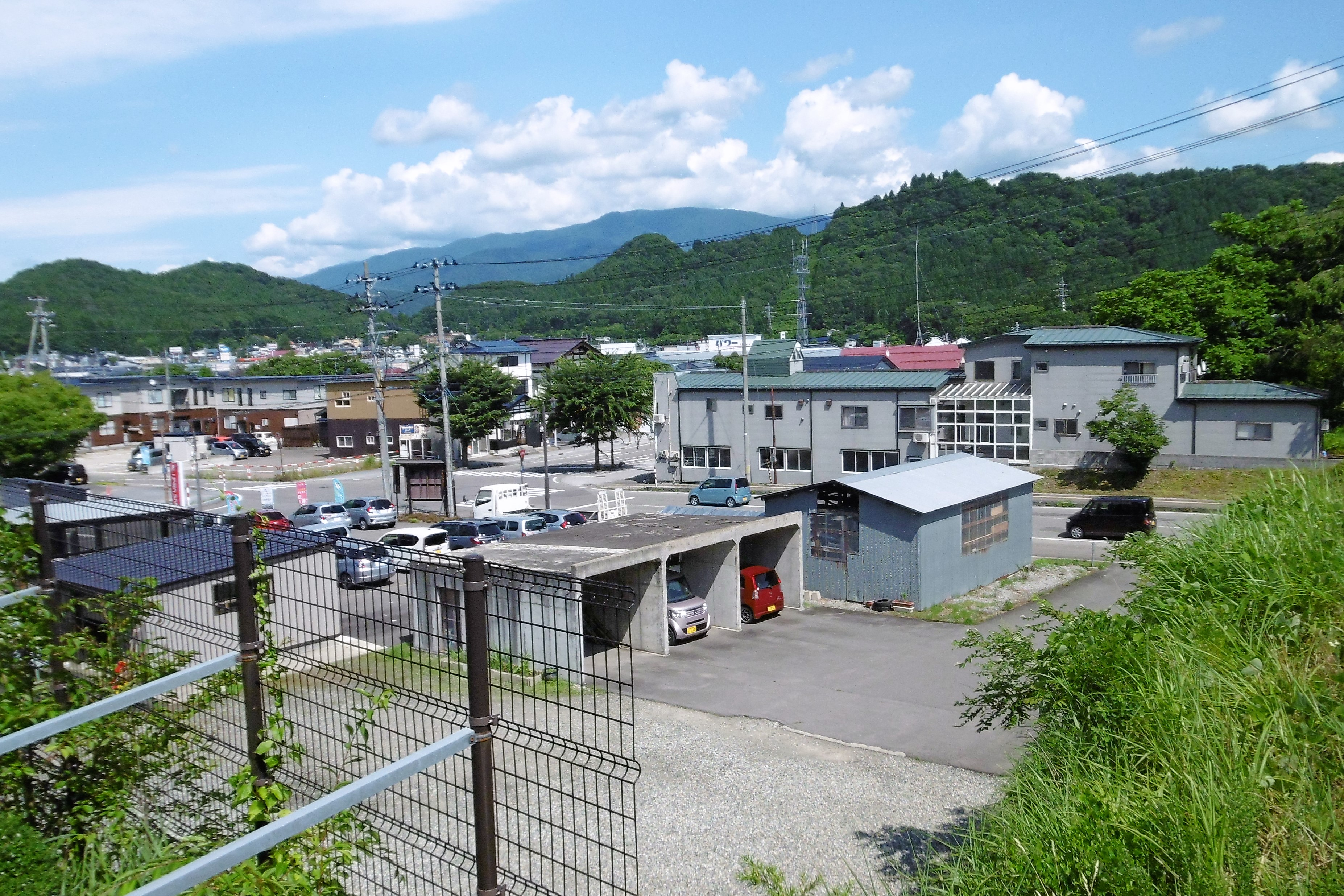 角館駅周辺